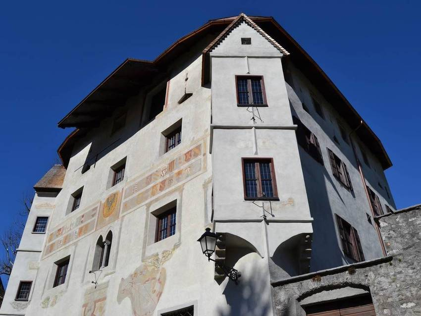 Palazzo delle Miniere